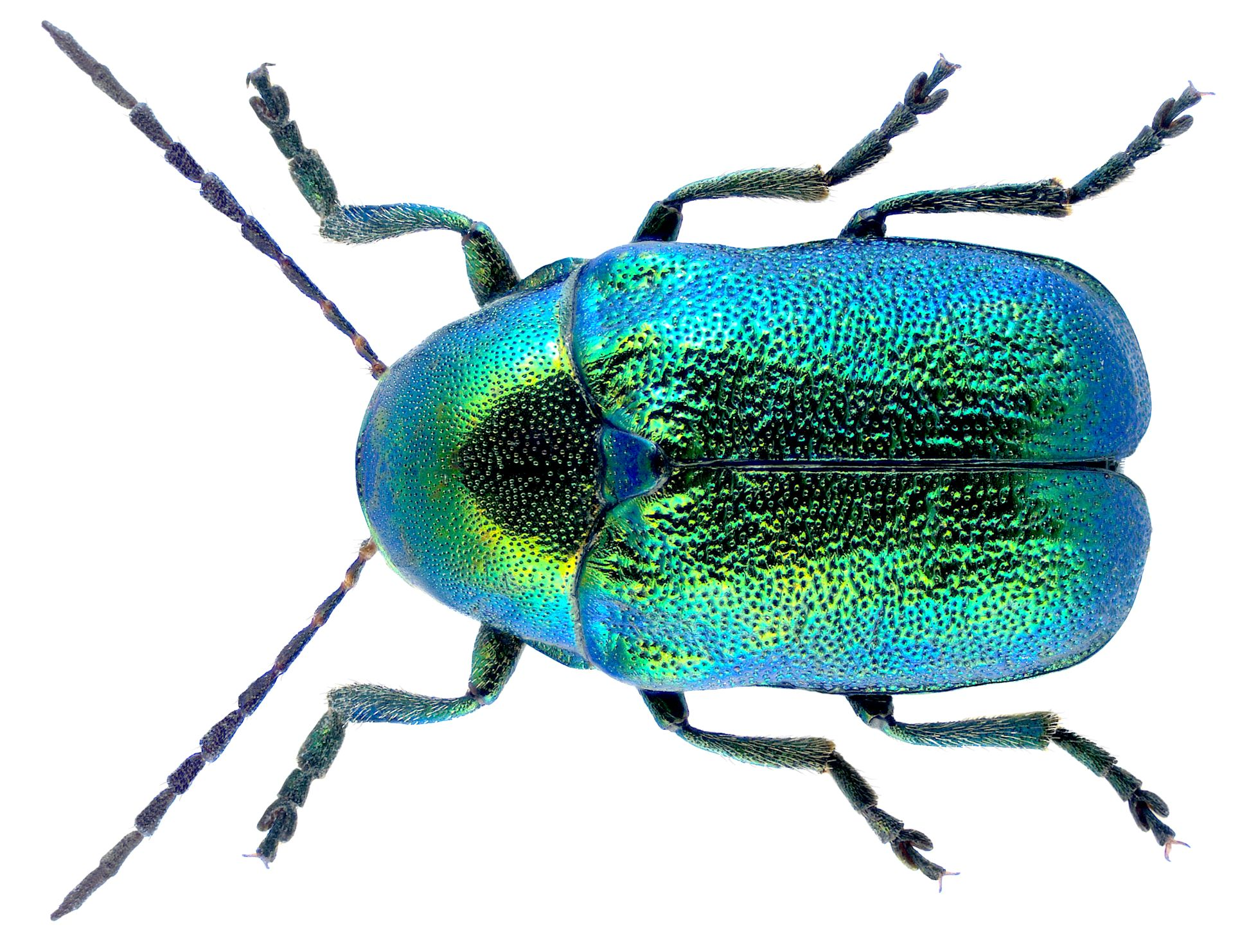 Cryptocephalus aureolus Suffrian, 1847 Familie: Chrysomelidae Grösse: 6-7 mm Verbreitung: Europa Ökologie: auf gelbblühenden Kompositen Fundort: Germania, Oberfranken, Kasendorf leg. det. U.Schmidt, 1973 Foto: U.Schmidt, 2006